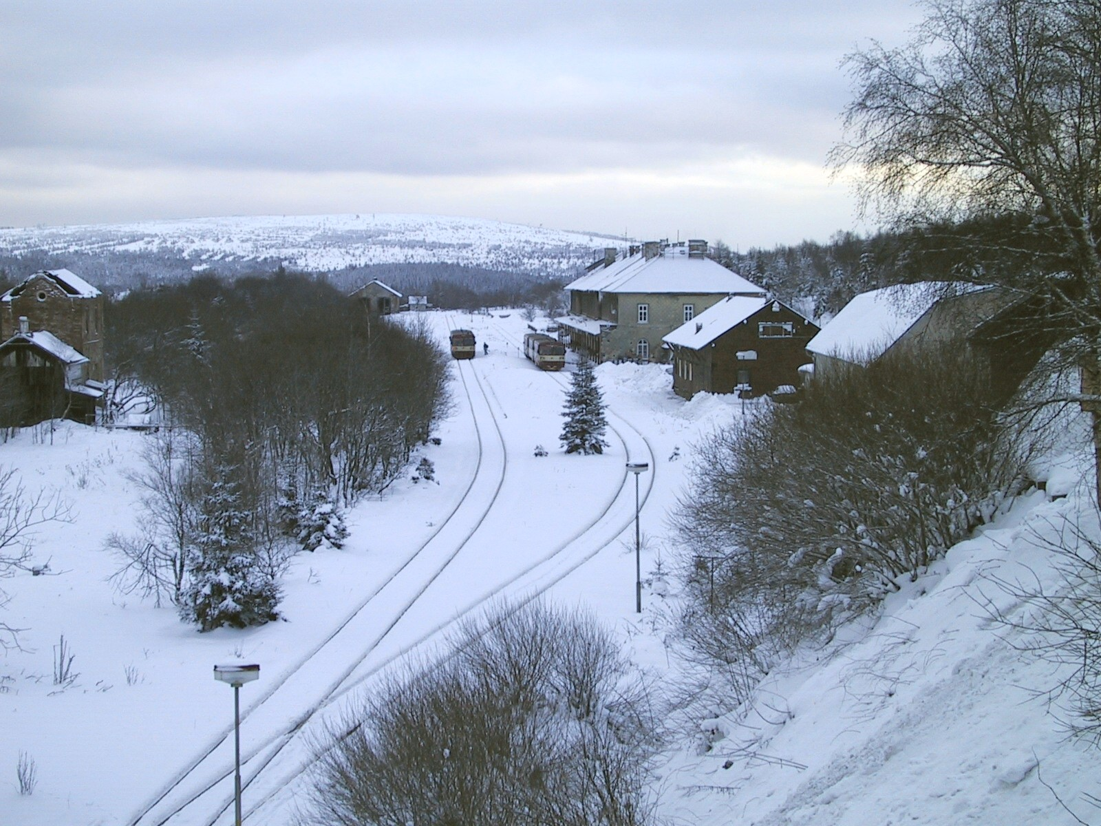 Bahnhof Moldau im Erzgebirge im Winter